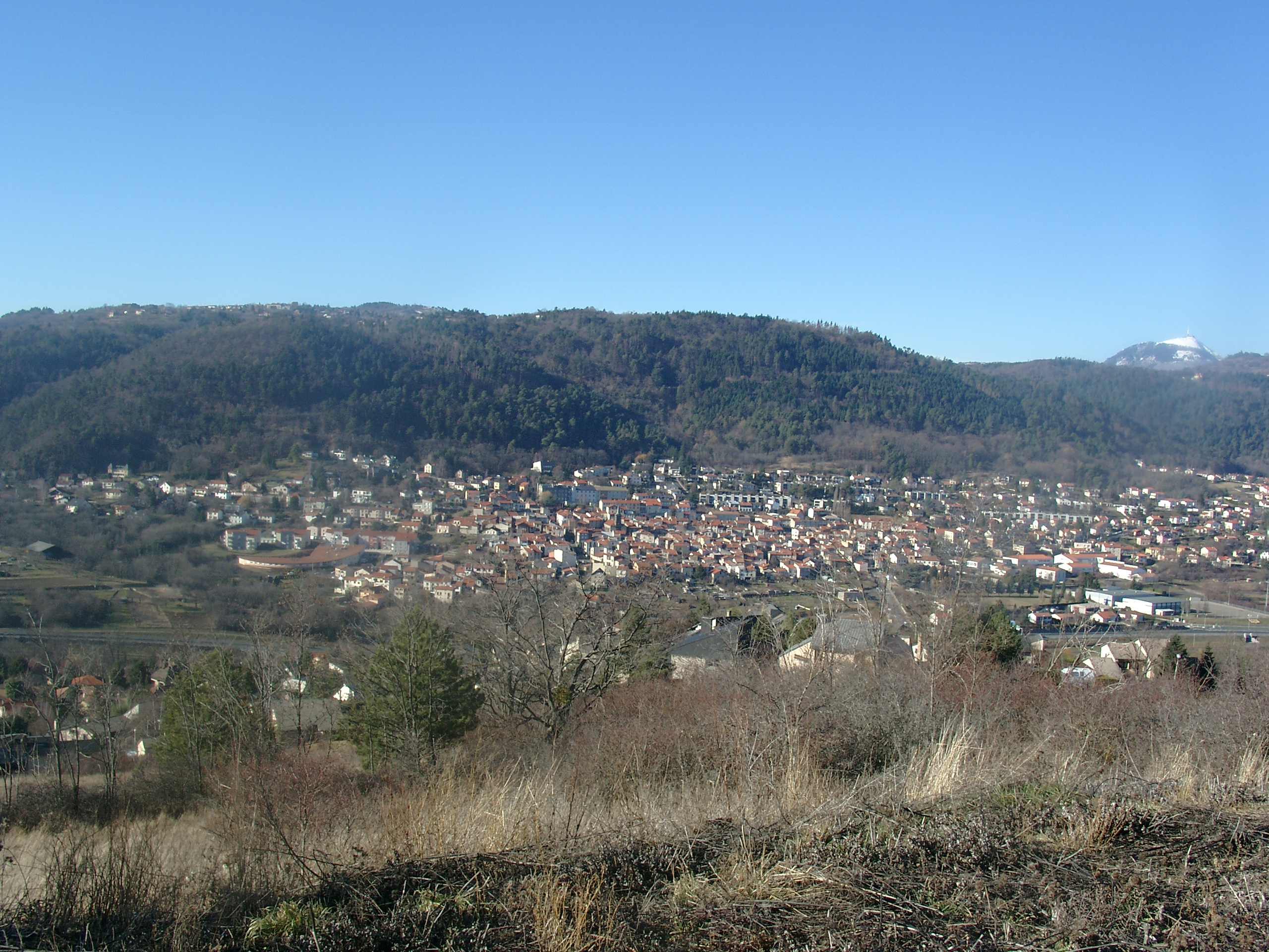 Bourg de Ceyrat, photographié depuis Montrognon. Mathieuvernin est l'auteur de cette photo. 14 janvier 2006